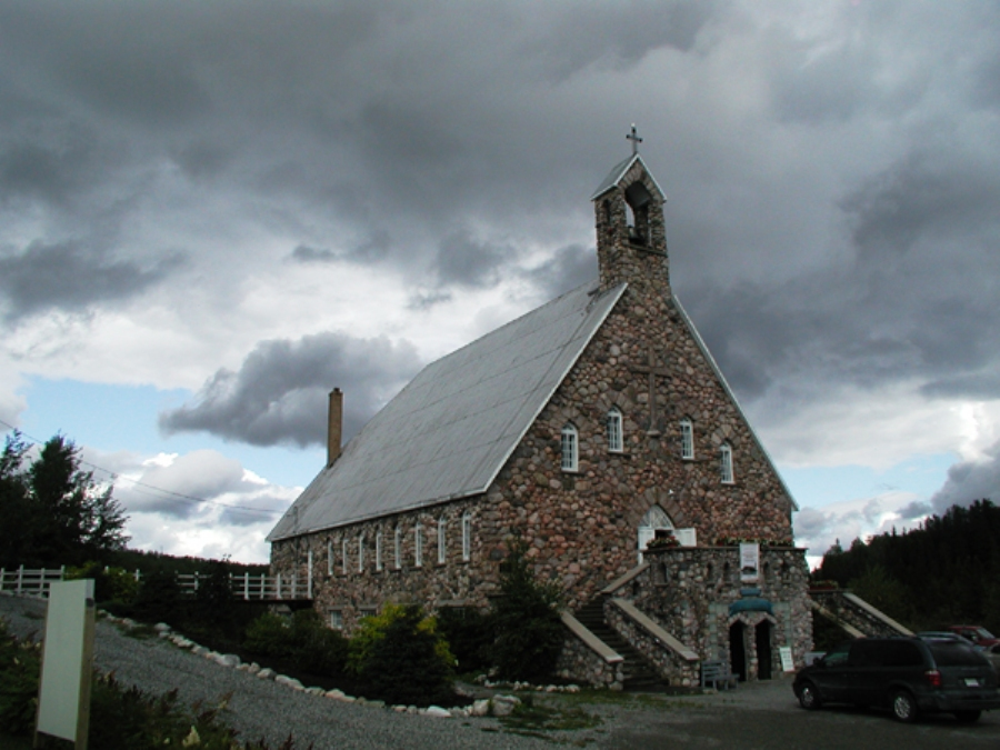 Église de Rapide-Danseur